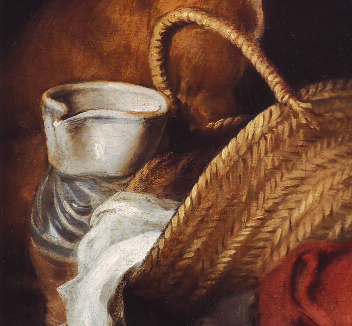 Detalle de la pintura al óleo de Bartolomé Murillo Vieja y chico